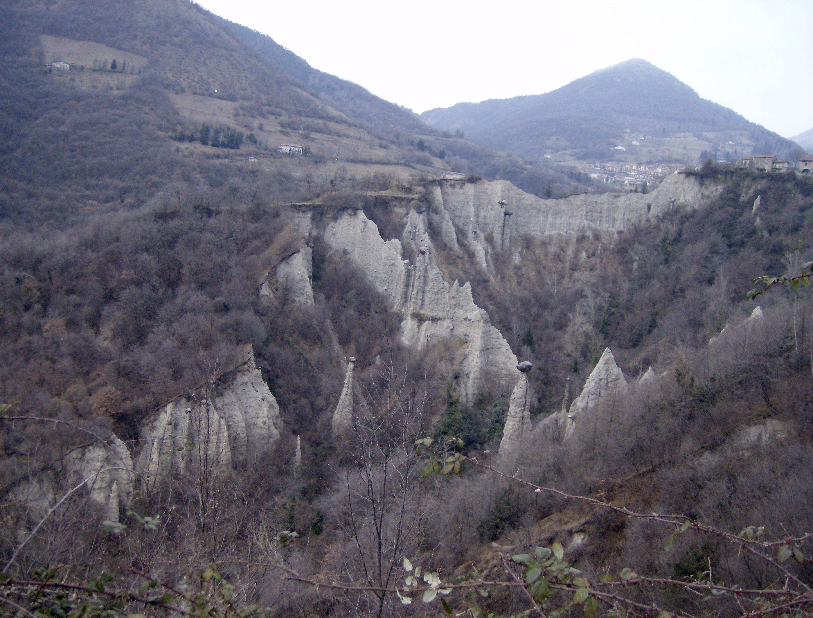 Piramidi di Zone (prov. BS)